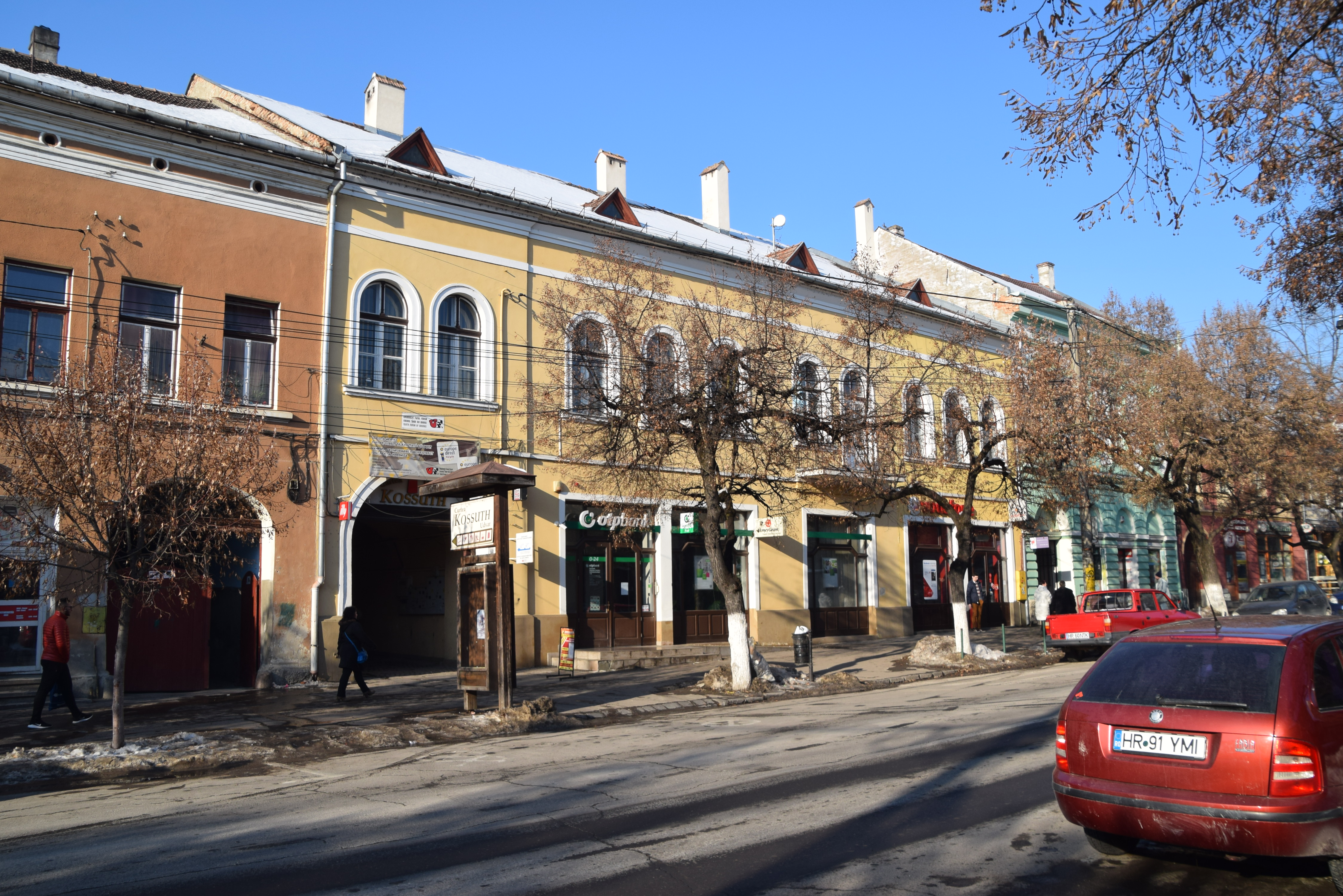 Fostul restaurant „București”, azi unitate comercială